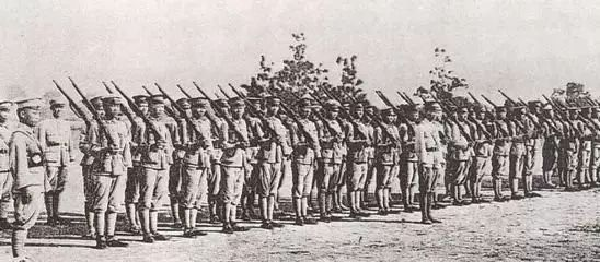 黄埔军校工兵学生军训